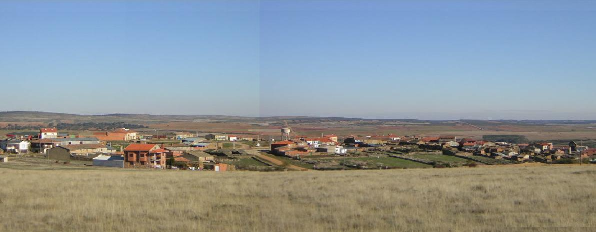 Foto Panorámica de Losilla